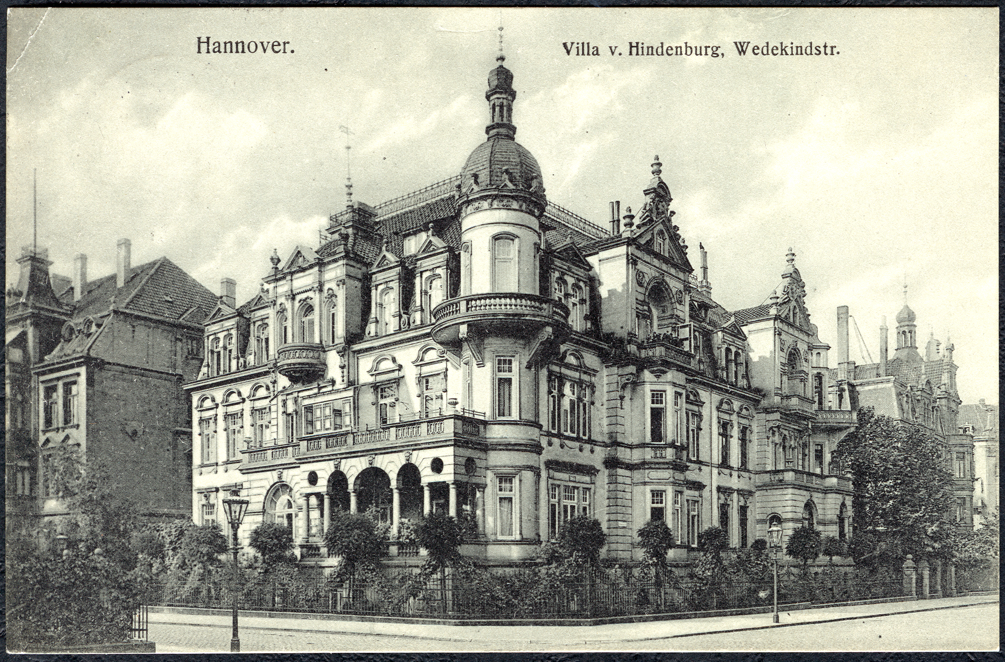 Ansichtskarte eines anonymen Fotografen der ab 1911 sogenannten (ersten) Villa von Hindenburg in Hannover, Wedekindstraße Ecke am Holzgraben ...